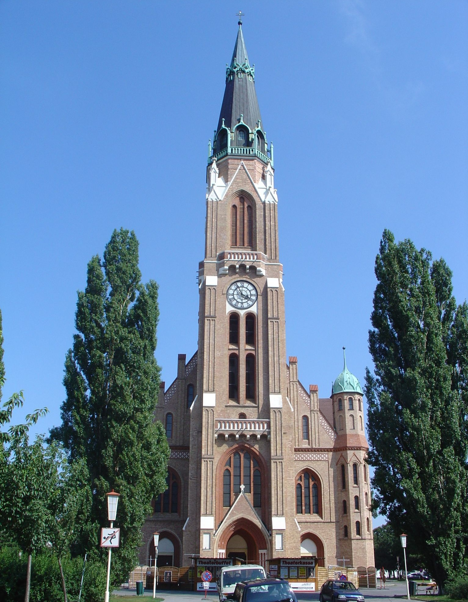 Donaufelder Pfarrkirche, Vienna XXI